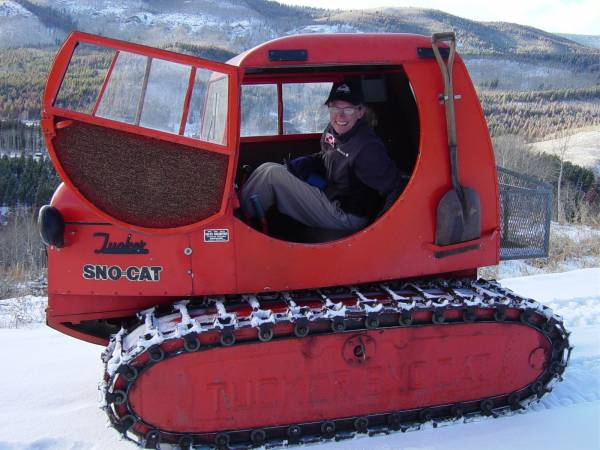 Curved door Tucker 222 Kitten.